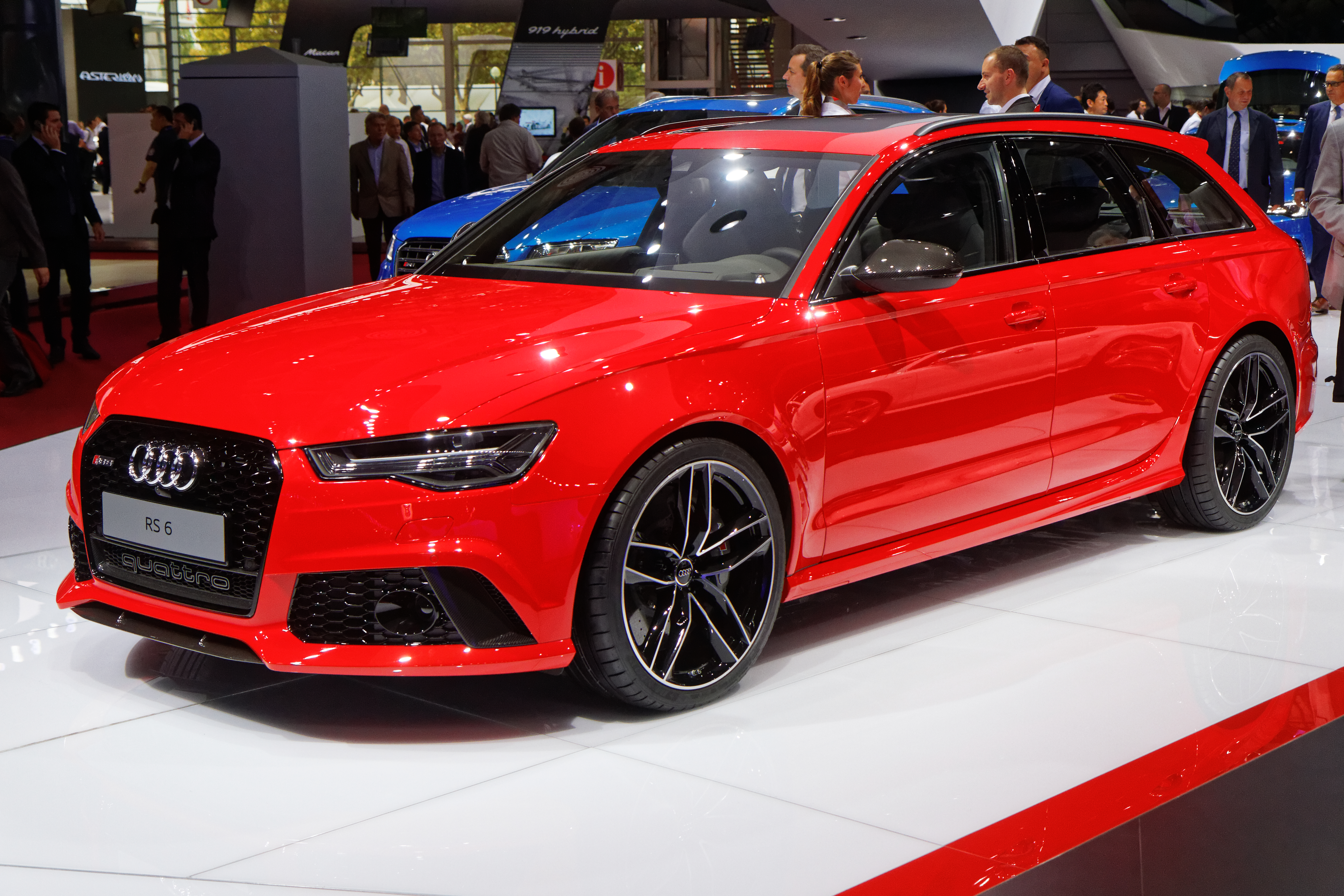 Une Audi RS6 présentée lors du mondial de l'automobile de Paris 2014.